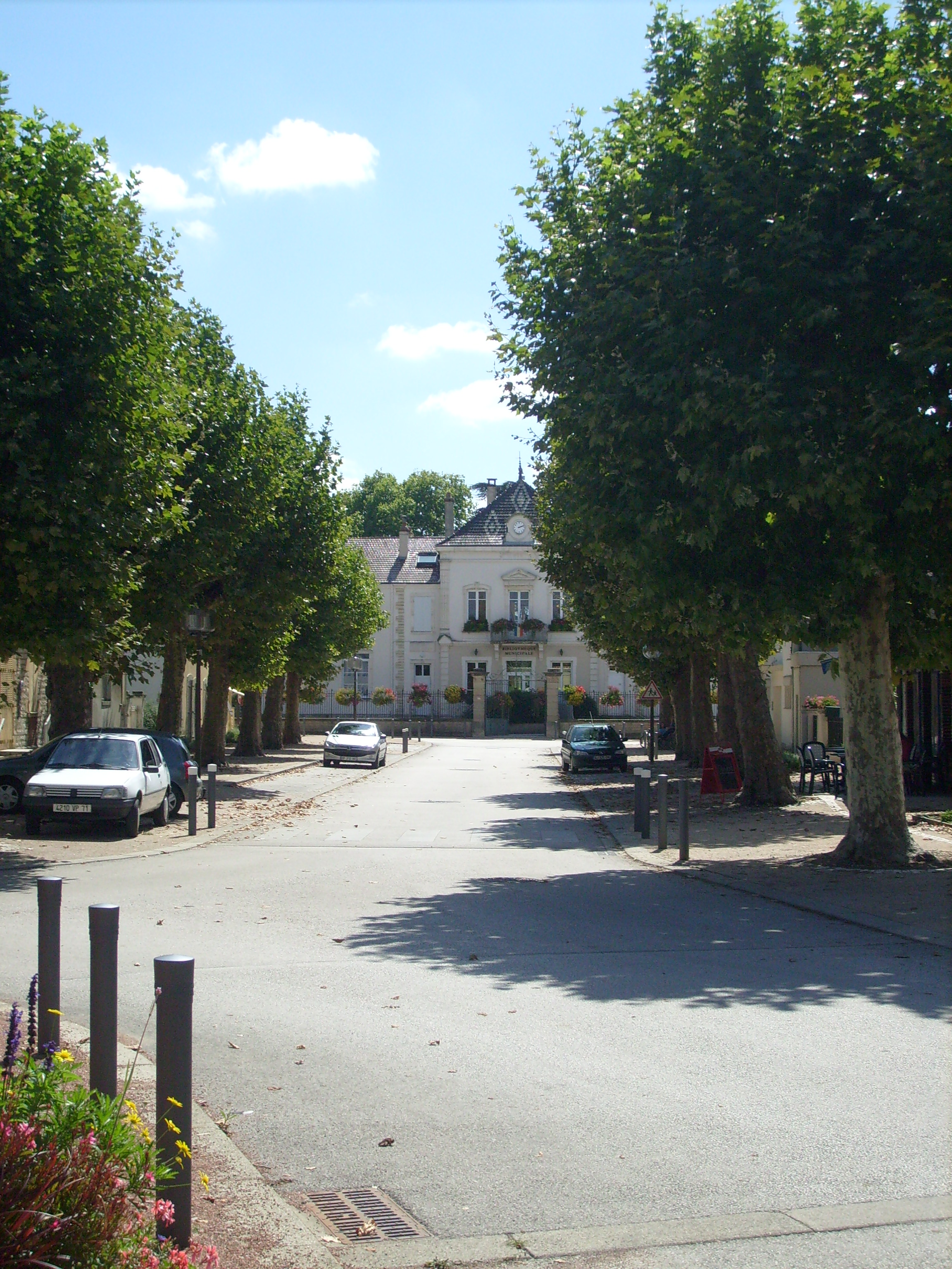 A Gergy (71) : Place Paul Chateau, en arrière plan, la bibliothèque municipale au centre, et l'école primaire sur ses ailes.